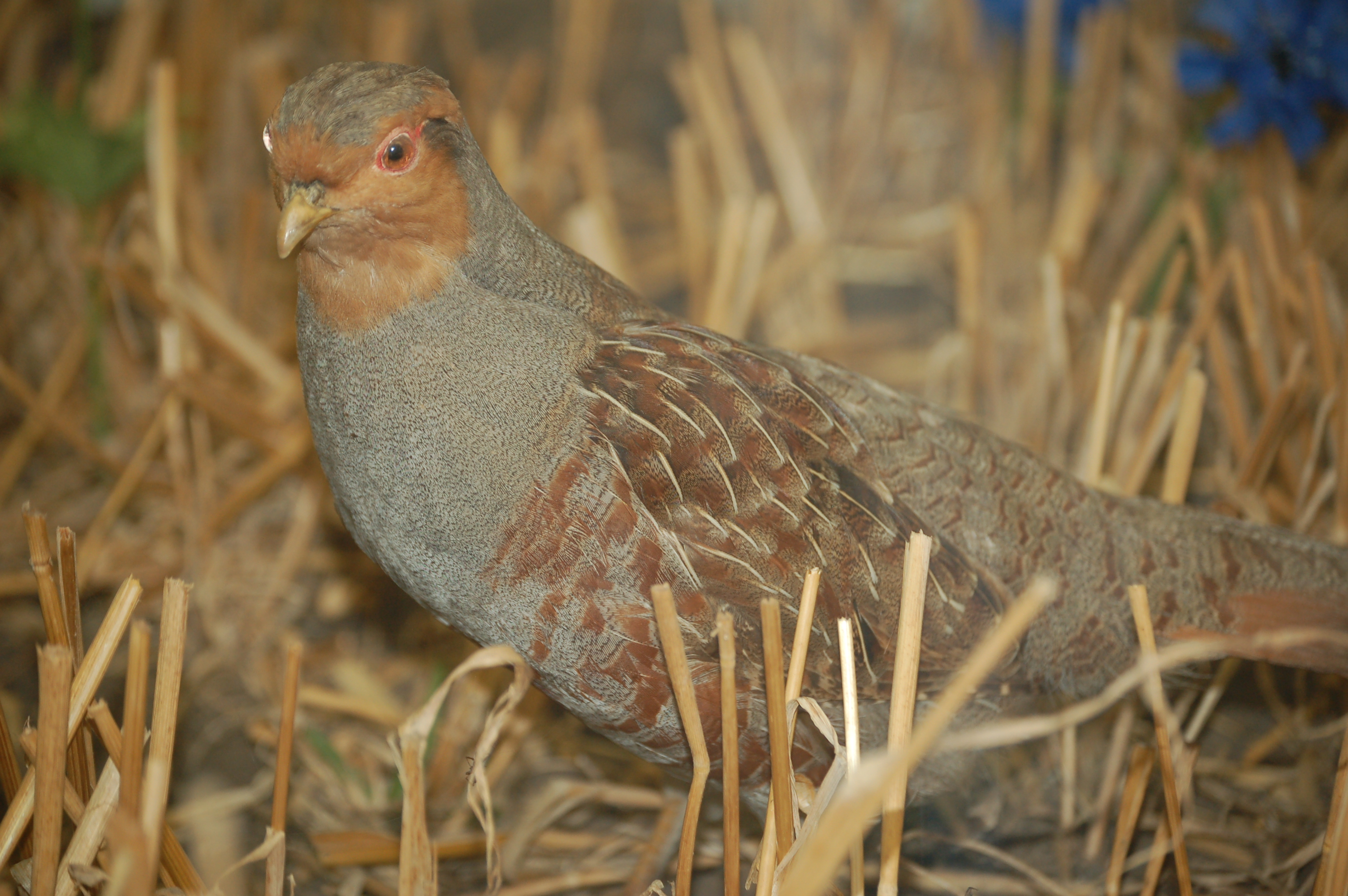 Rebhuhn im Wildpark Eekholt.